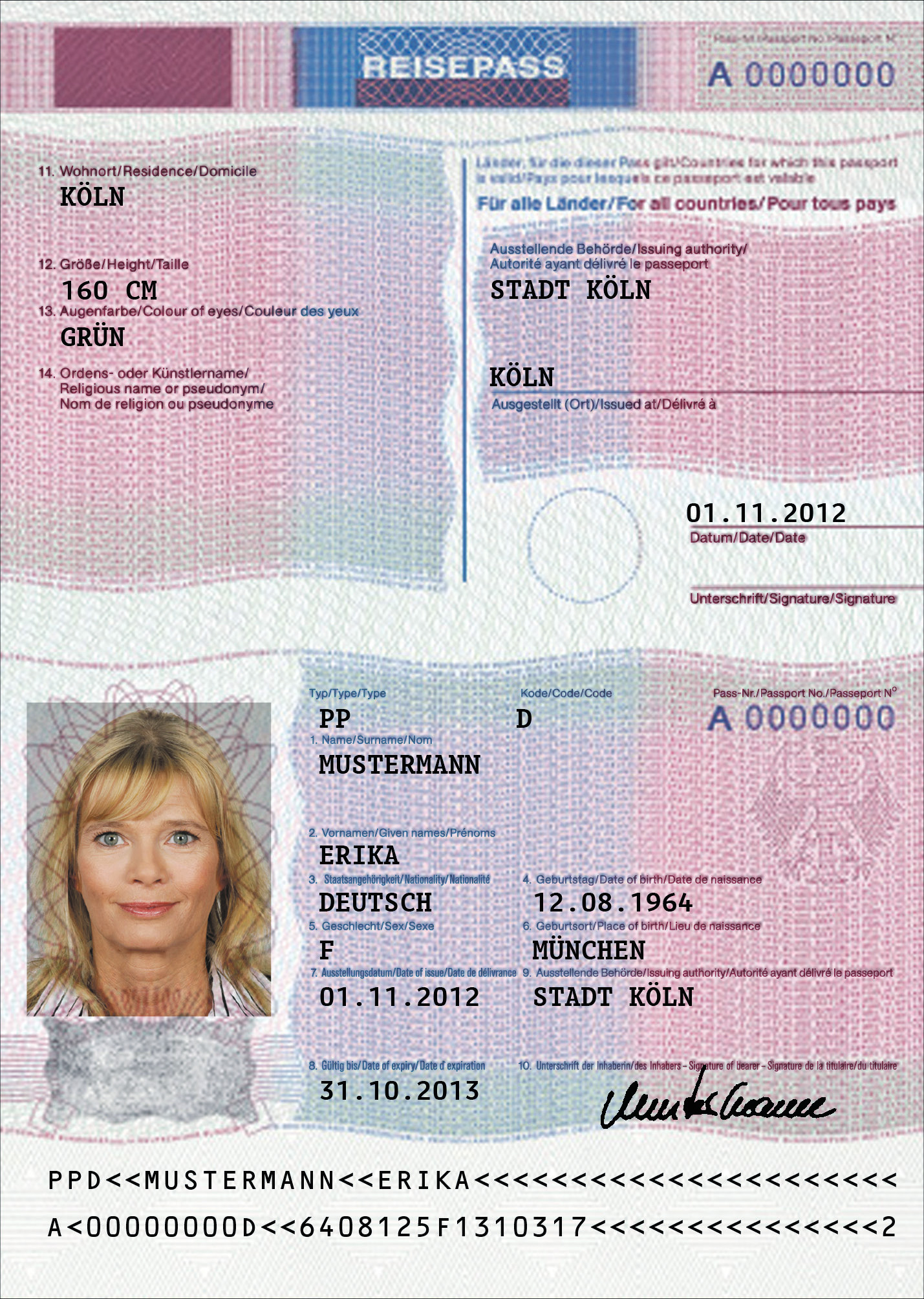 Deutscher vorläufiger Reisepass (Muster 2013)